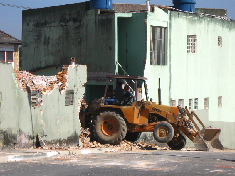 Obras de demolição na Paróquia São João Batista, no Itaim Palista, São Paulo. As obras se iniciaram em Julho de 2011, afim de se contruir uma nova igreja no local. O terreno se encontra na rua José Cardoso Pimentel. – Case 580H.